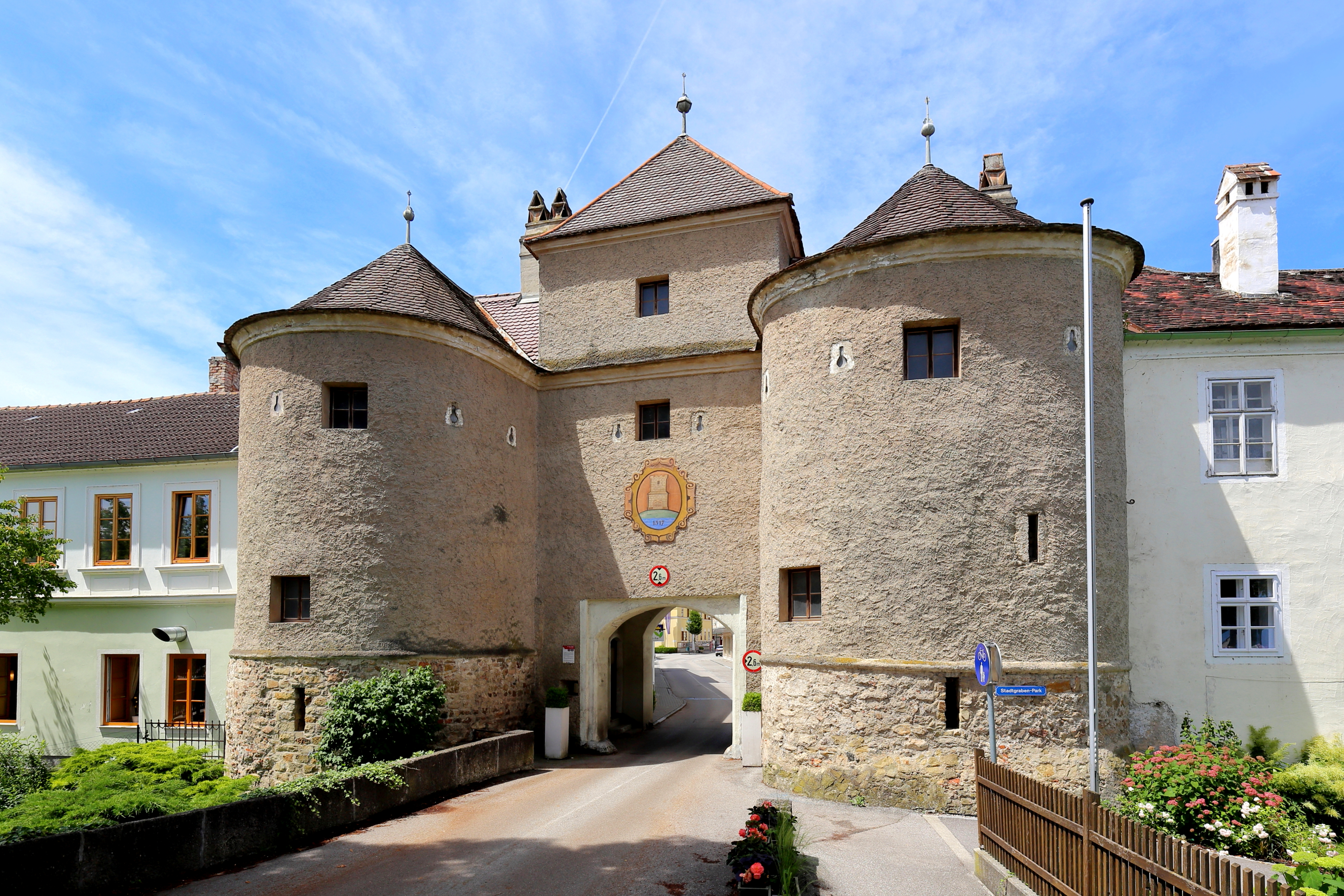 Außen- bzw. Ostansicht des Römertores, auch Wiener Tor bezeichnet, in der niederösterreichischen Stadt Traismauer.Ursprünglich war es die Porta principalis dextra (rechtes Haupttor) des römischen Kastells. Der Dachaufbau und die Torhalle sind aus der Gotik. Das imposante Bauwerk aus der Römerzeit mit den beiden Hufeisentürmen ist auch das Wahrzeichen der Stadt.